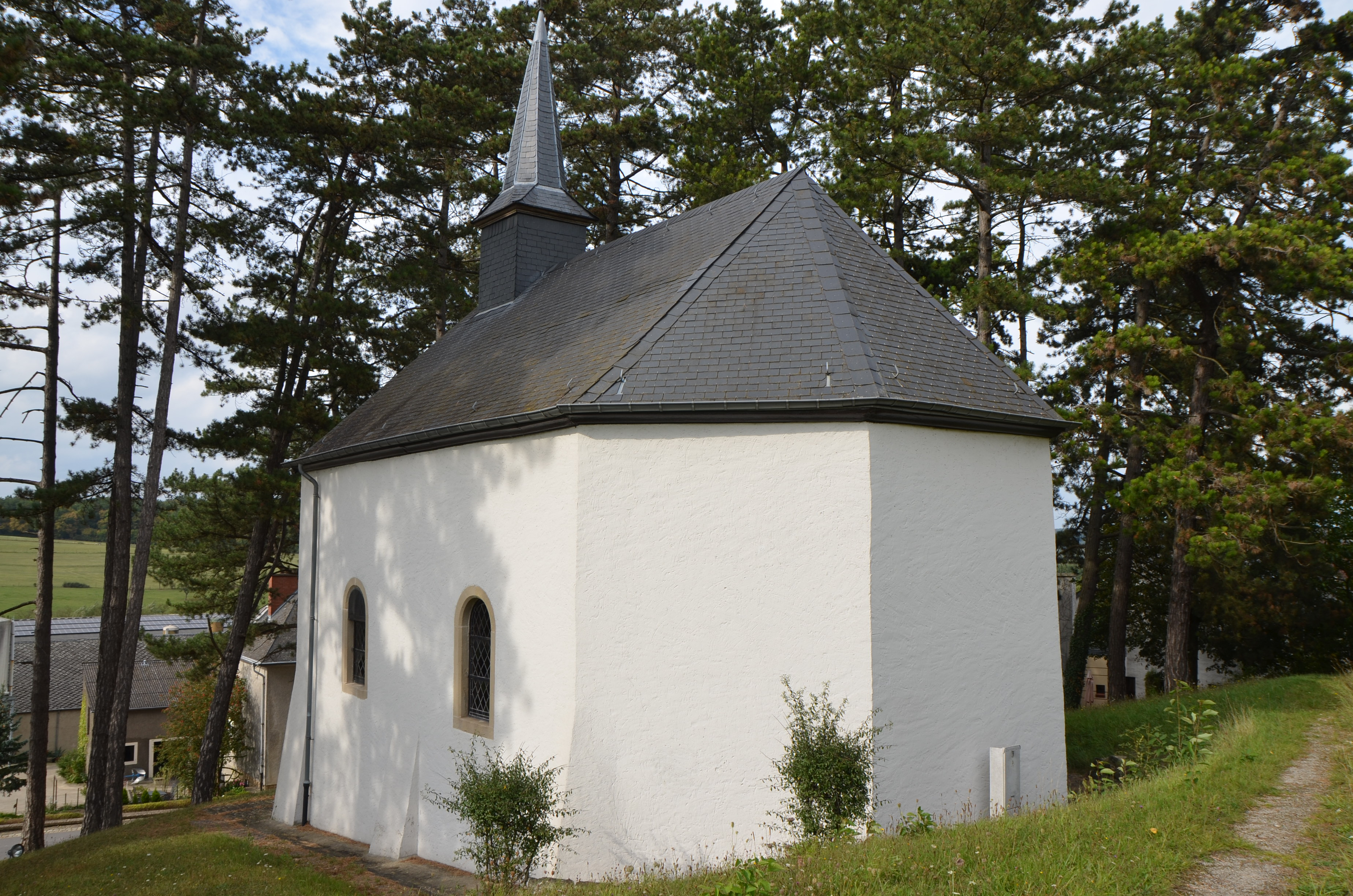 Kapelle in Oberglabach